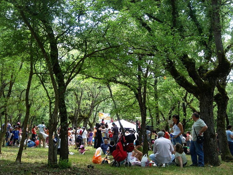 Araba Euskaraz 2006, Armentian (Gasteiz)